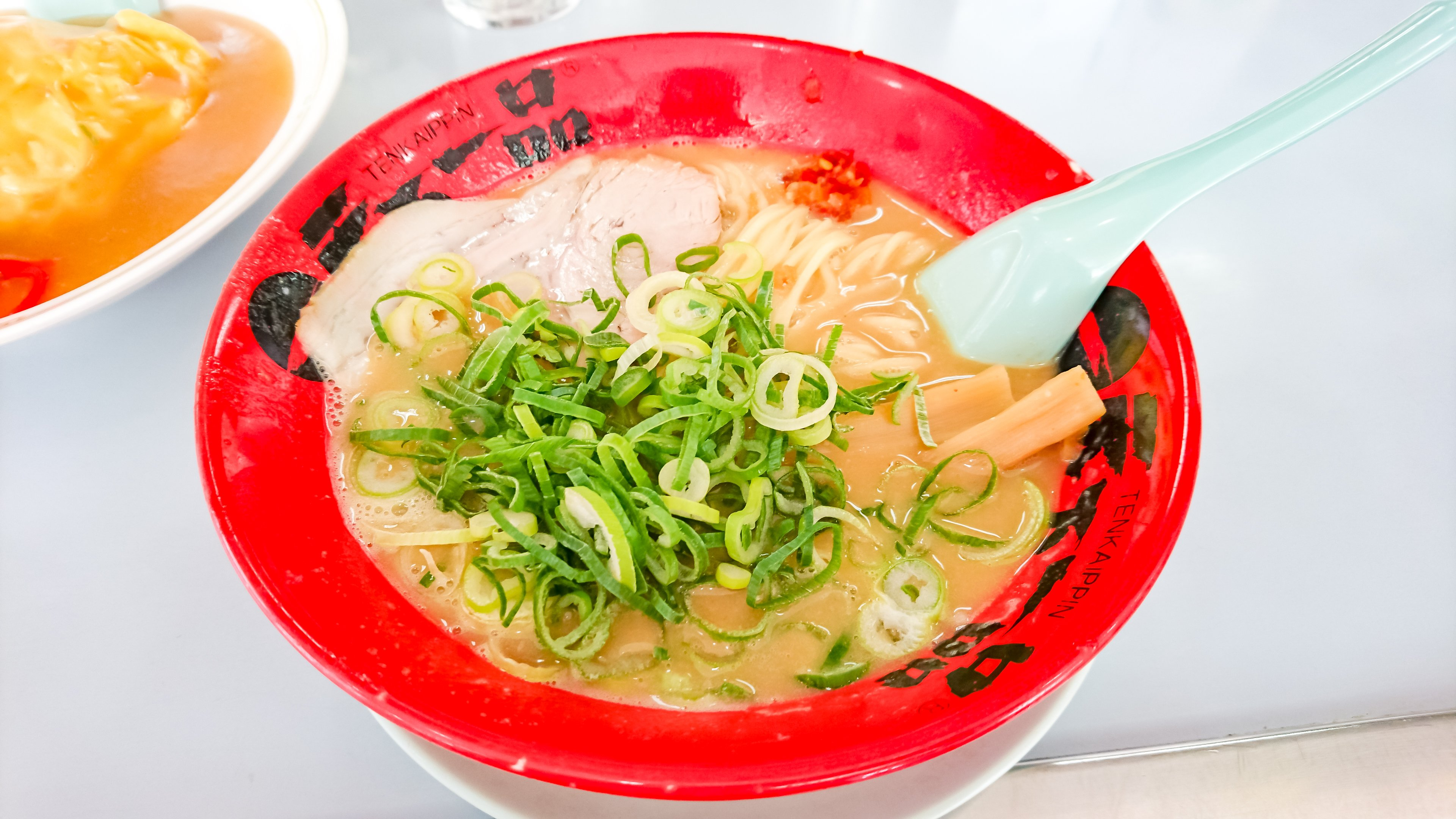 京都府京都市中京区、ラーメンこってり、天下一品二条駅前店、ラーメン